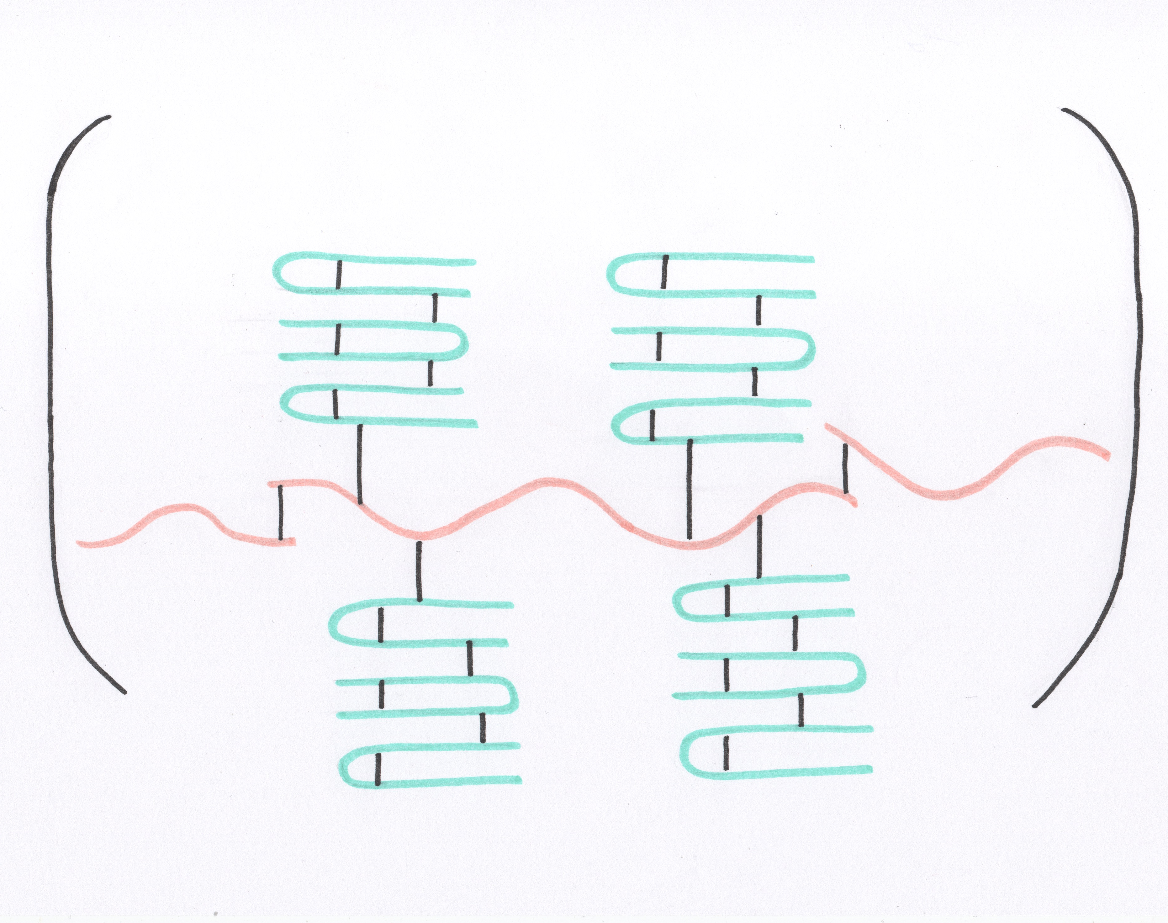 Dibuix estructura Glutenina